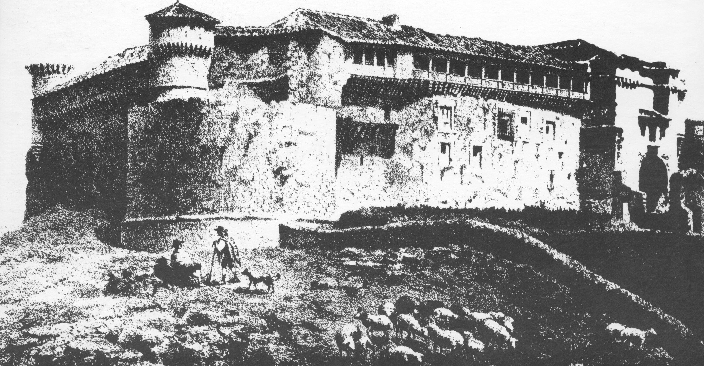 Litografía del Castillo de Cuéllar, por Francisco Javier Parcerisa en 1865.